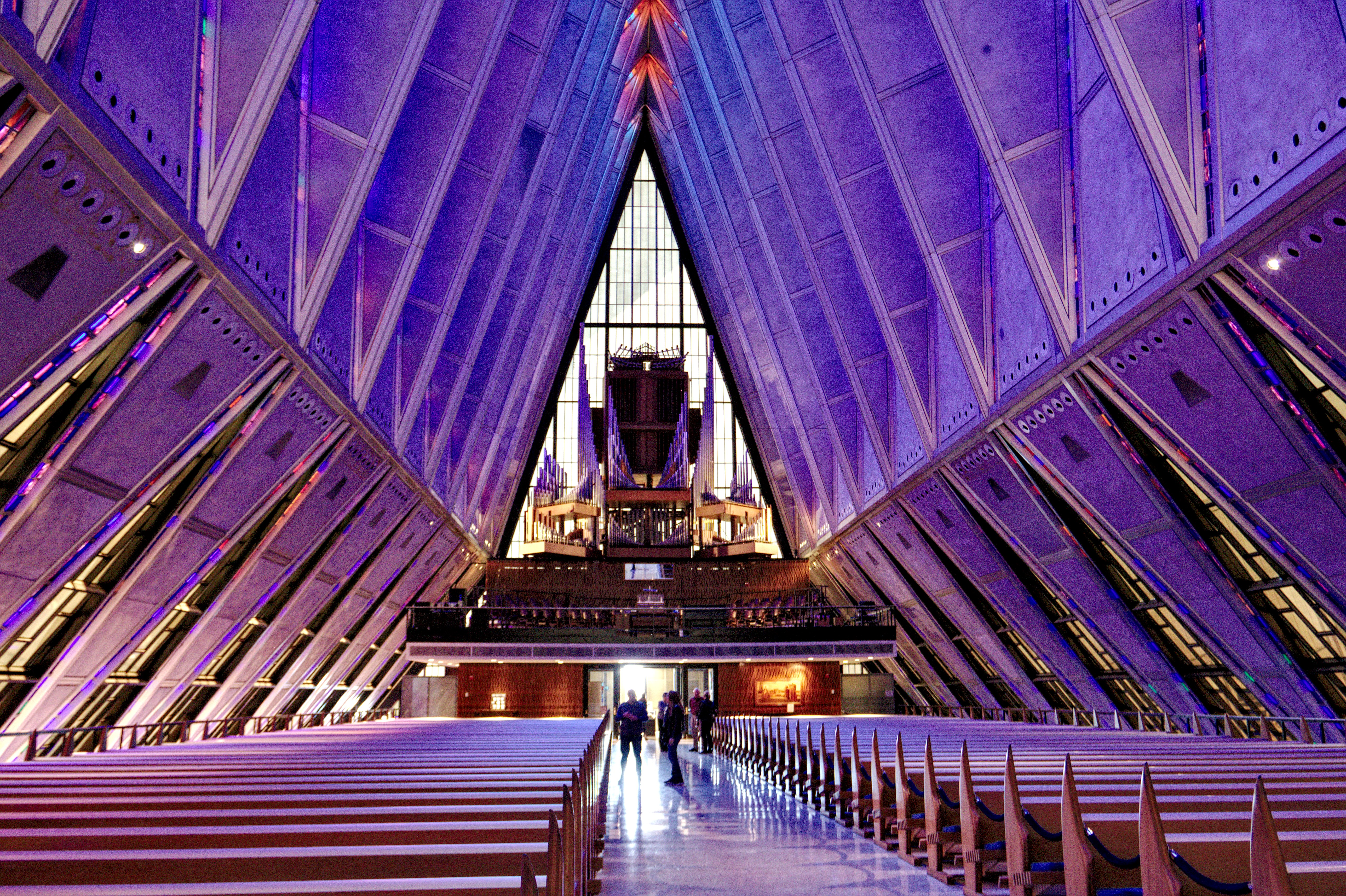 Interno della United States Air Force Academy Cadet Chapel